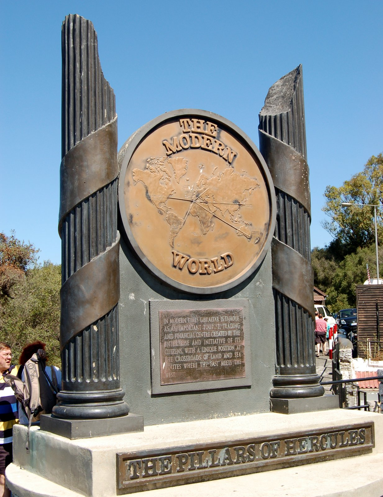 2012-08-15 11.06.53.jpg